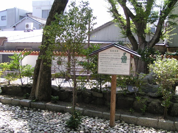 天台烏薬の木、2005年8月1日徐福公園内で投稿者が撮影。Category:新宮市の画像、Category:都市公園・庭園の画像。